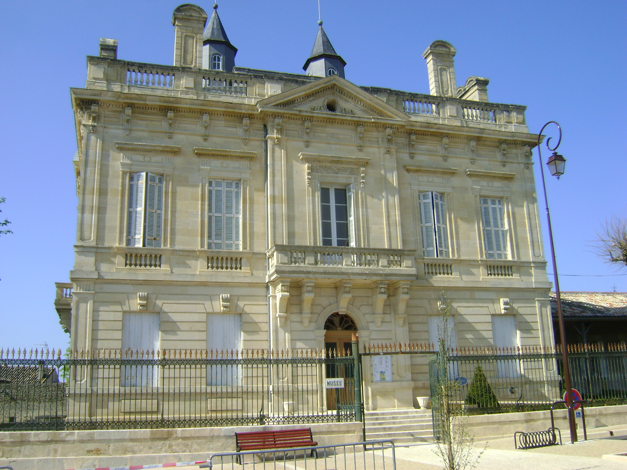 Mairie de Villefranche-de-Lonchat, (Inscription, 2002)